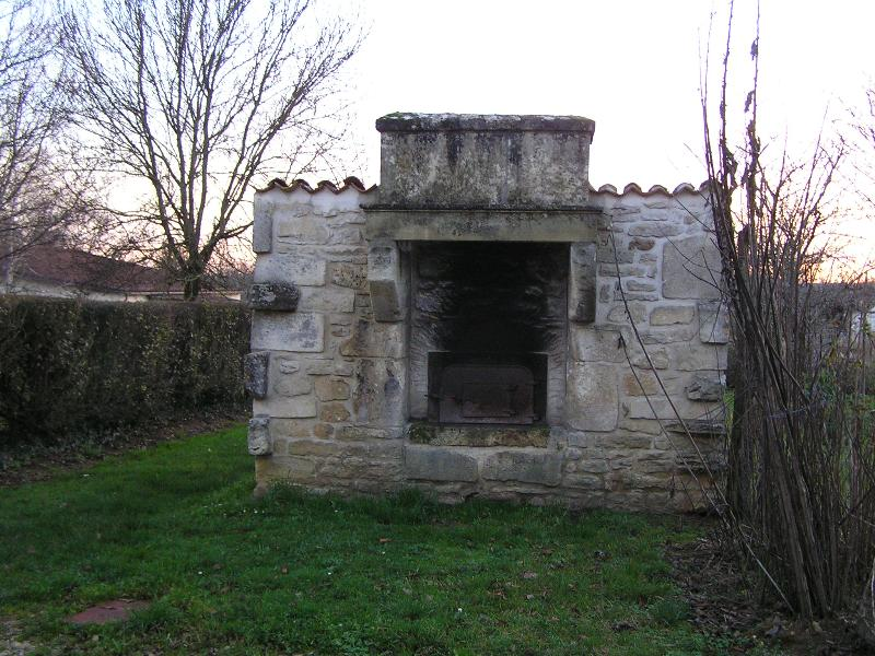 four à pain de Villars les Bois